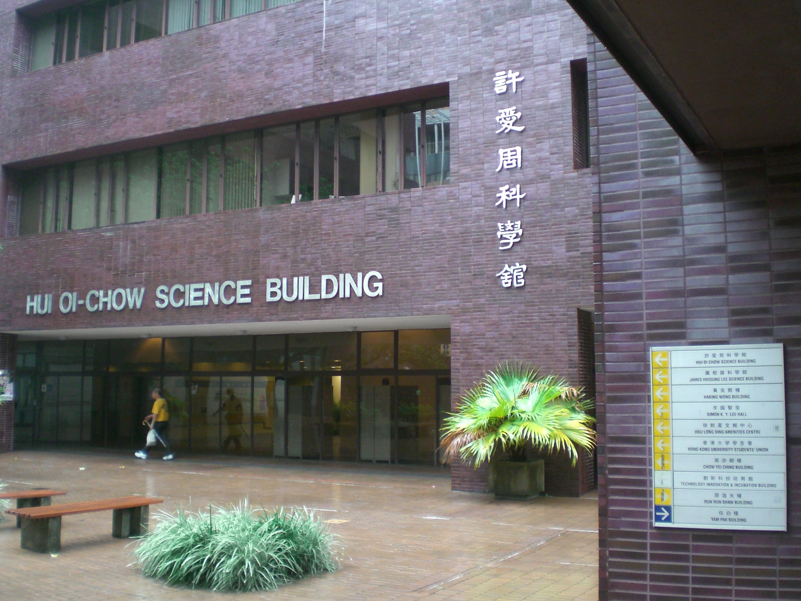 位於zh:香港大學校園內的zh:許愛周大樓.